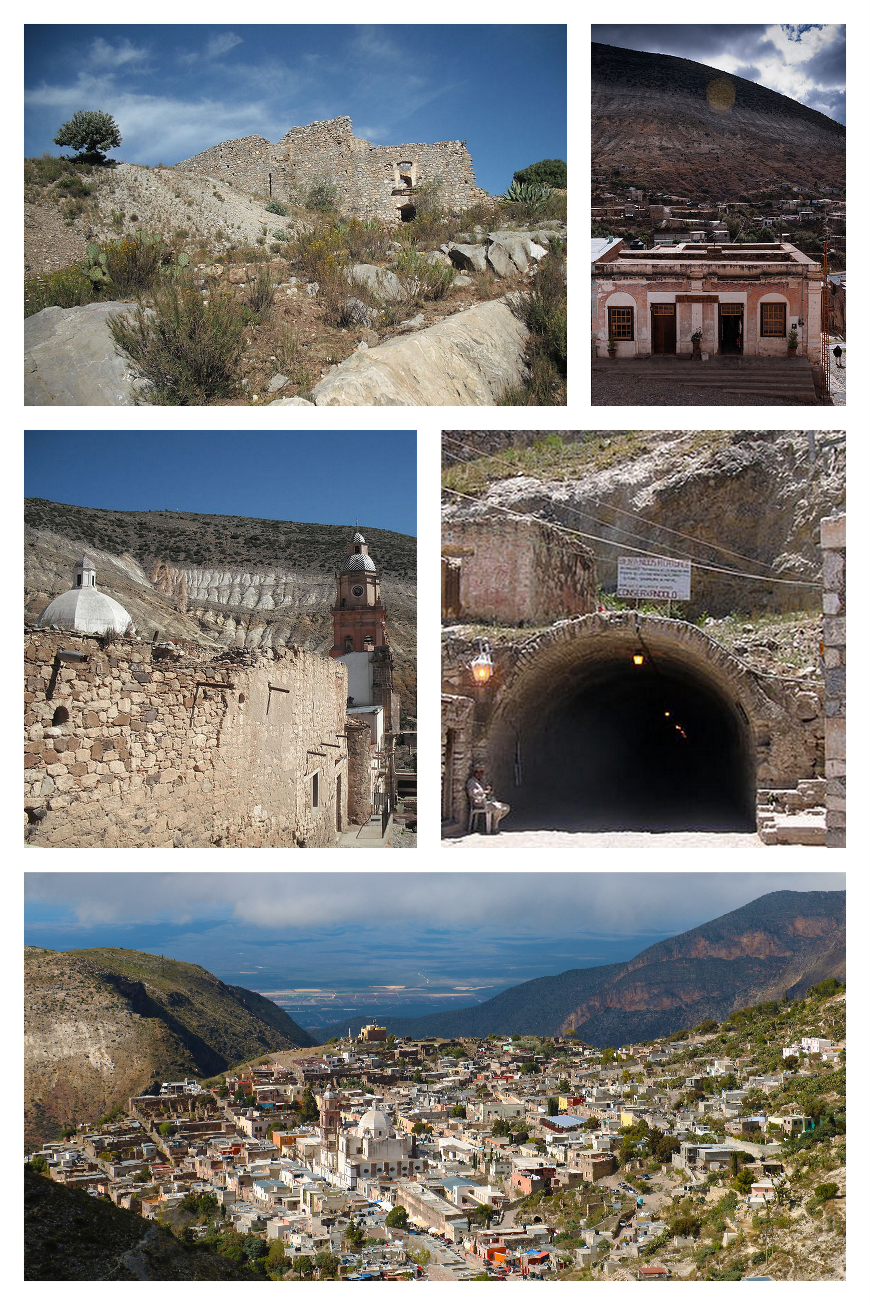 Montaje creado a partir de cinco imágenes en Wikimedia Commons: File:MineRealC.JPG File:Real de Catorce (4474379170).jpg File:SanFranCath.JPG File:Tunnel to real catorce.JPG File:Panorámica de Real de Catorce.jpg